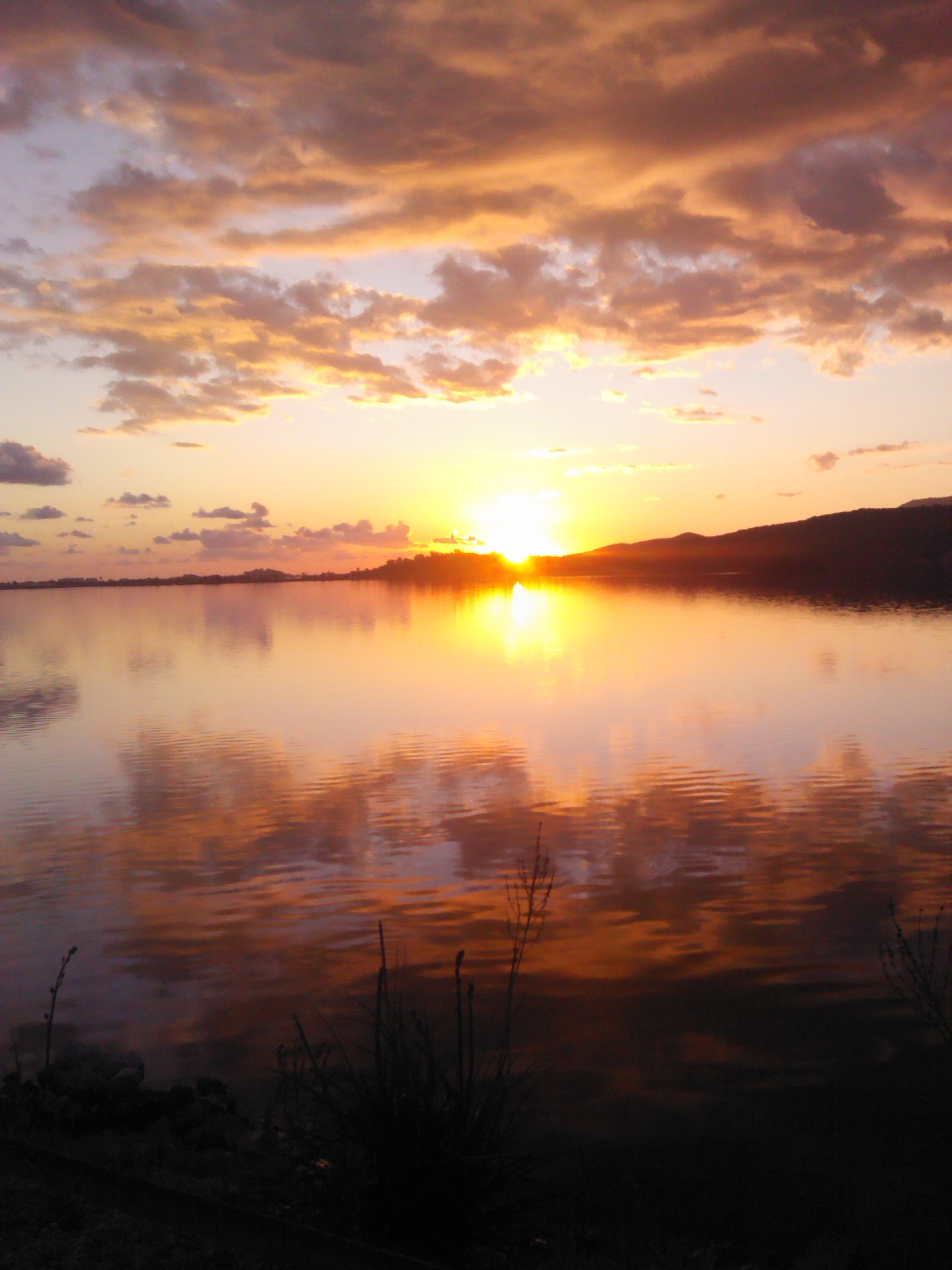 DEMRE GÜN BATIŞI